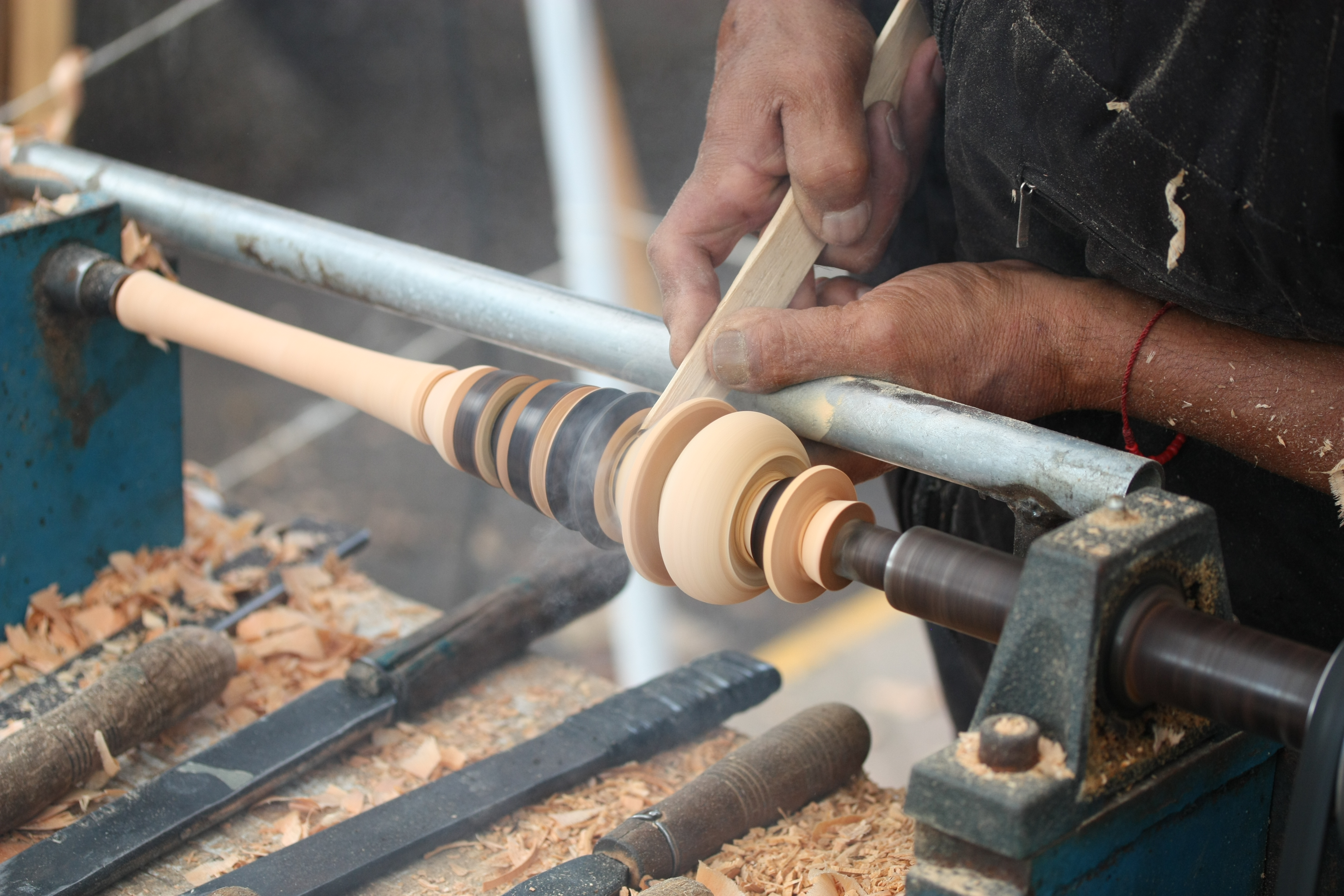 Detalle del proceso de elaboración de un molinillo de madera en torno